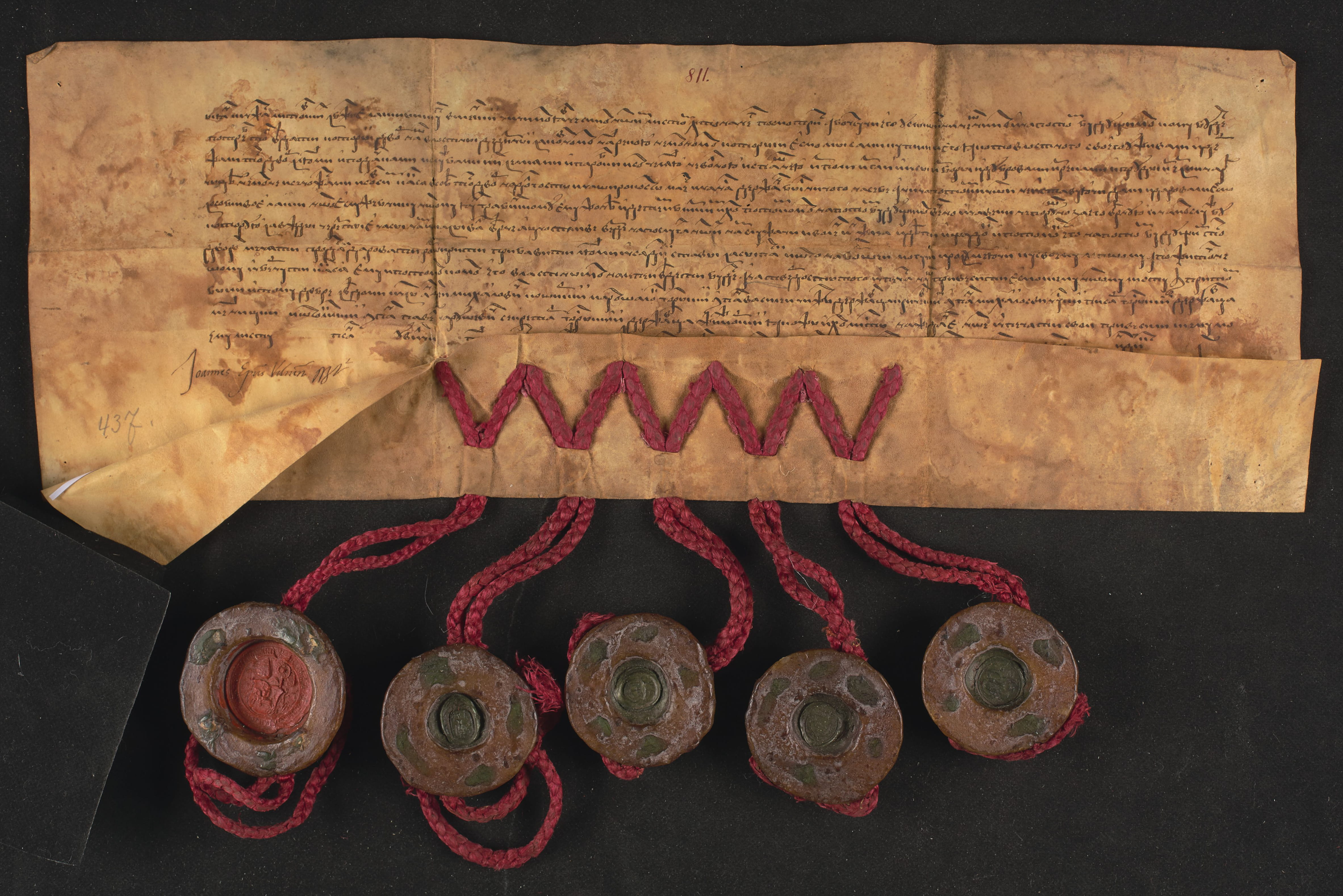 Ян, литовський княжич, єпископ вільнюський, дарує у власність Яну Грабінському за вірну службу свій двір з домашнім майном, що знаходиться за Ковно, над рікою Німан.